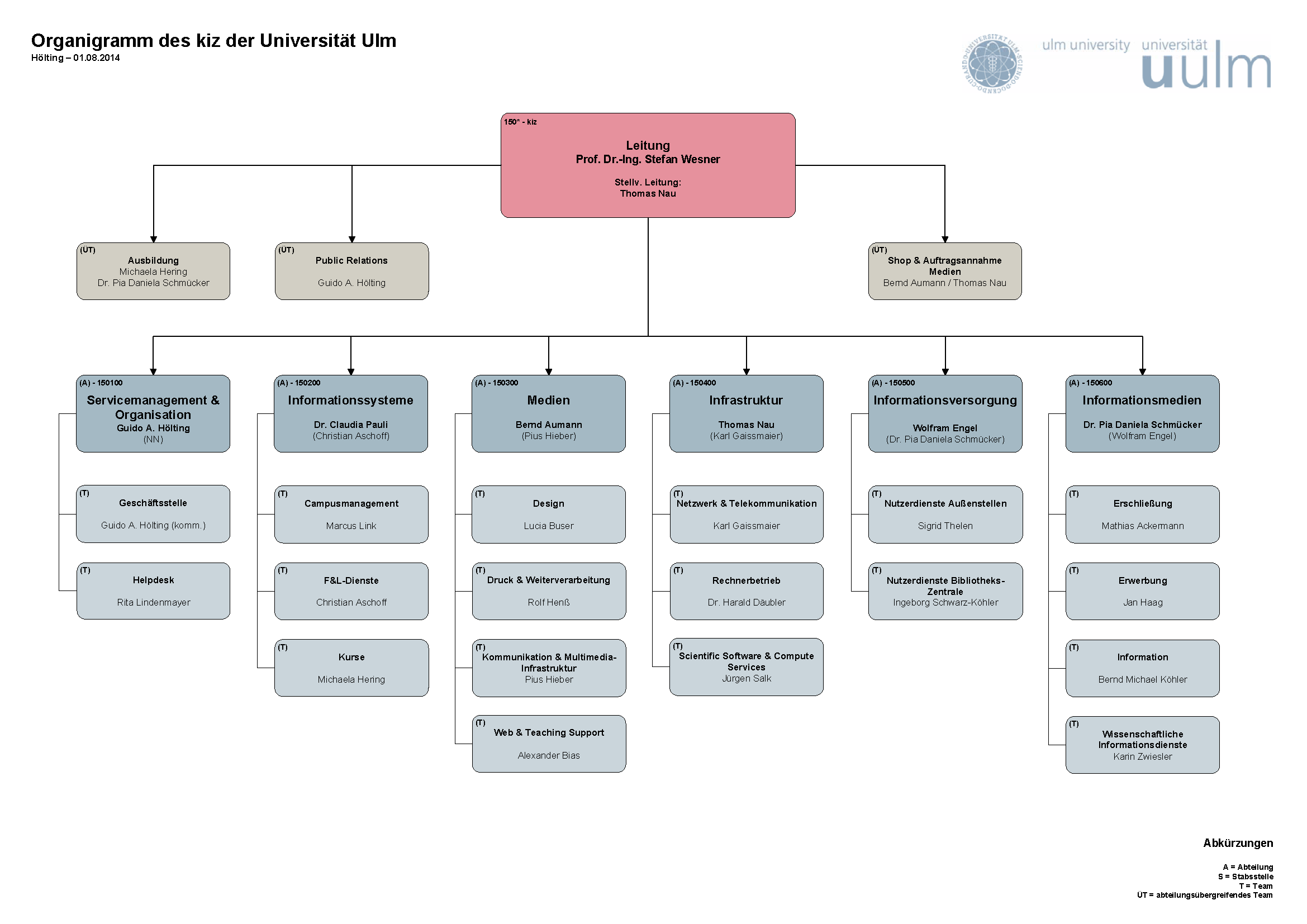 Organigramm - Aufbauorganisation des Kommunikations- und Informationszentrums (kiz) der Universität Ulm